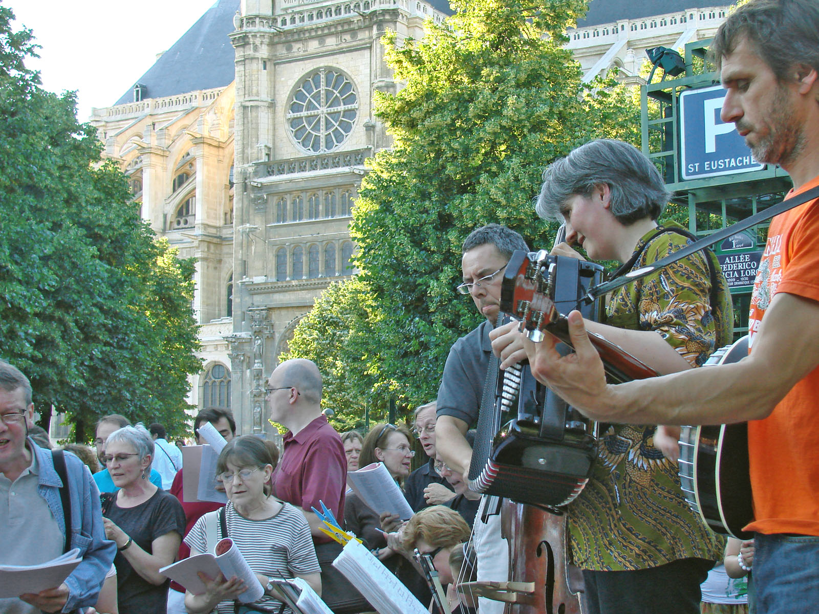 Il y a dix ans, des parents d'élèves décidaient de se rassembler autour de l'accordéon d'Élisabeth pour animer la fête de l'école et faire chanter parents et enfants. Depuis, ils n'ont jamais arrêté. Les Bachiques Bouzouks, après avoir investi les bistrots devenus rapidement trop petits, ont décidé de se réunir dans la rue, le plus souvent dans le 1er arrondissement de Paris, quartier où l'aventure a débuté. Plusieurs fois par an, autour d'un accordéon, d'une contrebasse et d'un banjo, les Bachiques et leurs « piliers » sèment de la joie en invitant qui veut à chanter avec eux. Ils sont tous les ans à la Fête de la Musique et on a plaisir à les y retrouver.